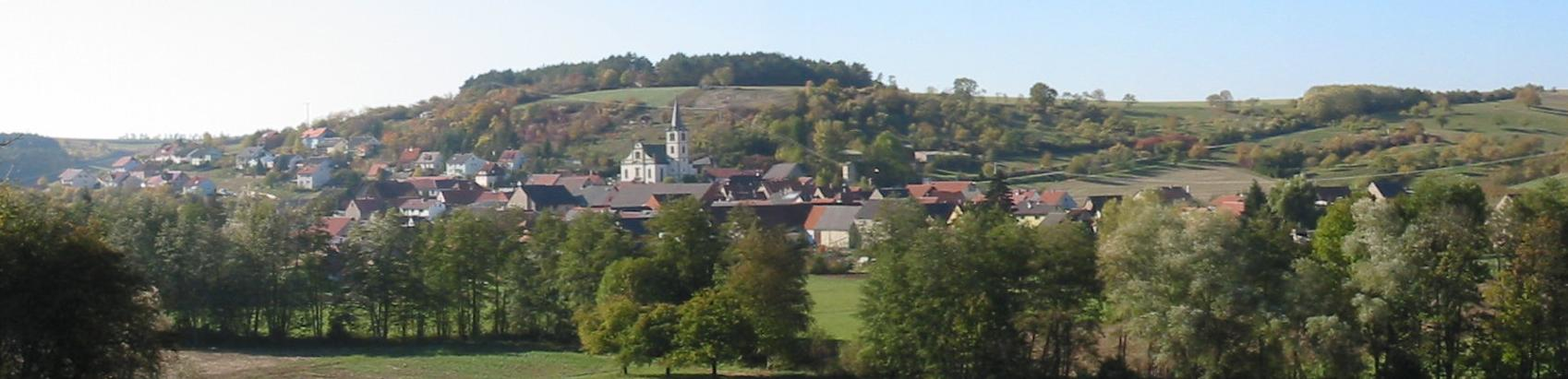 Blick auf Halsheim aus süd-/östlicher Richtung